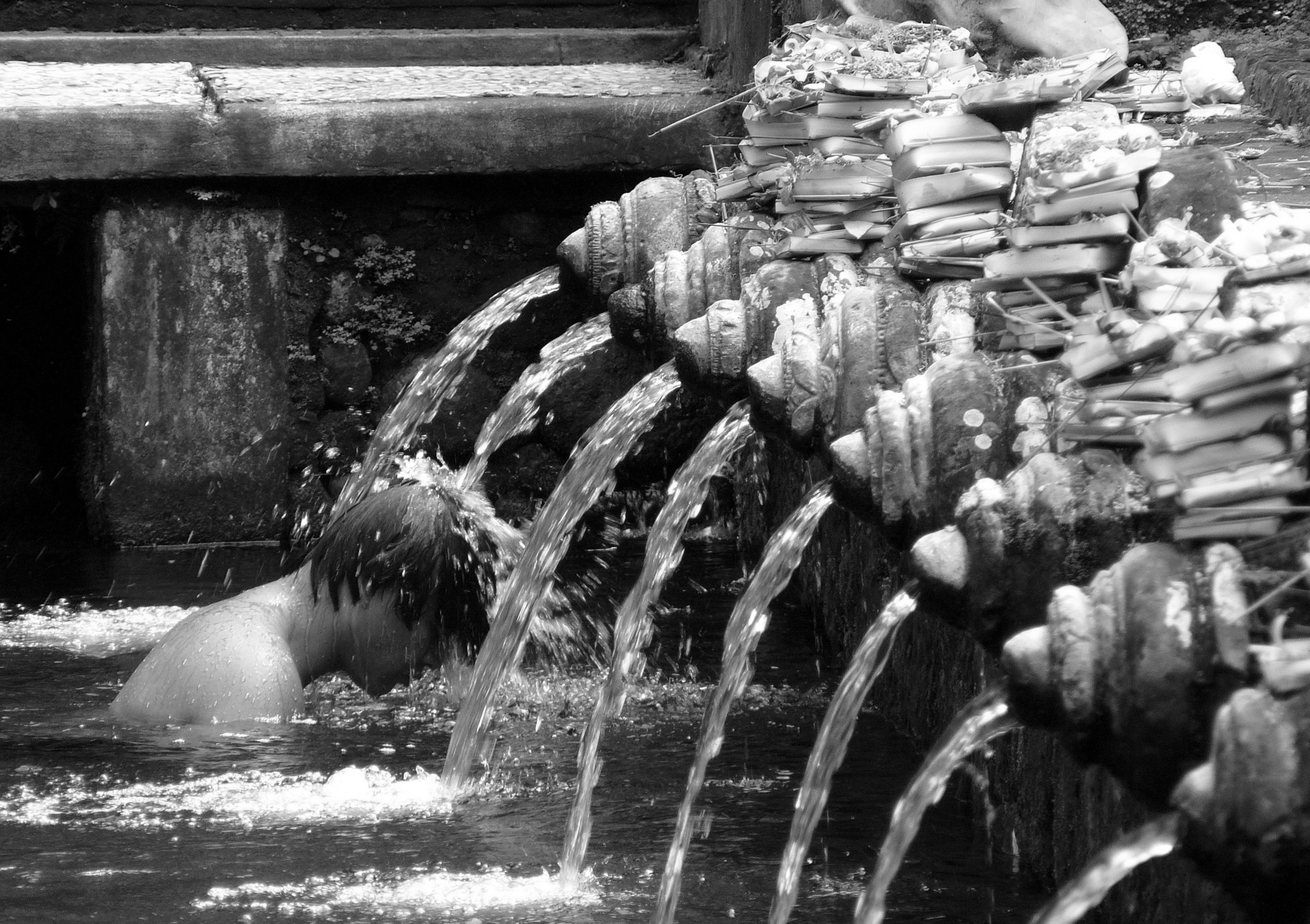 Tirta Empul, Tampaksiring, Bali